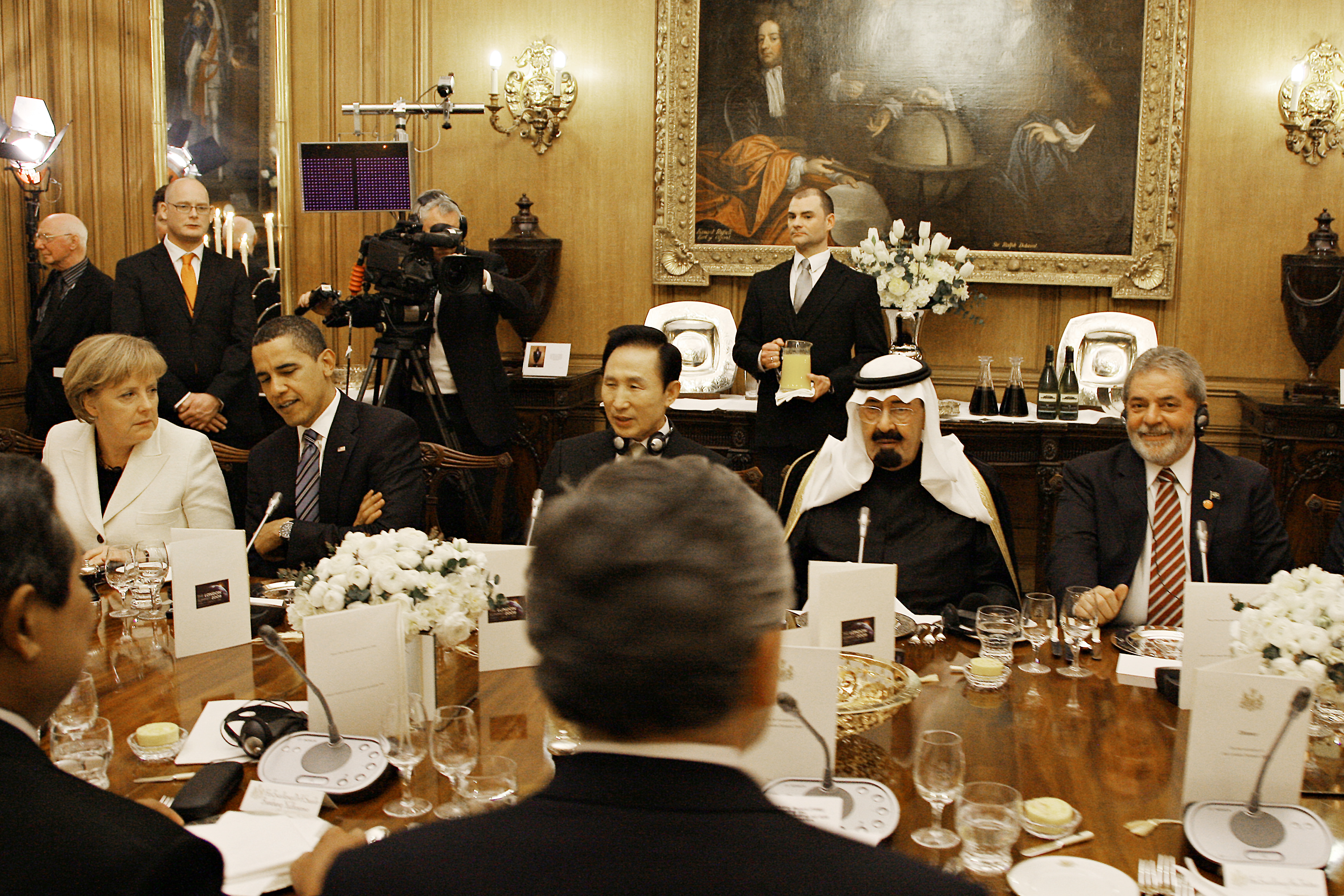 Chefes de Estado, que estão na capital do Reino Unido para o encontro do G20, vão a jantar oferecido pelo primeiro-ministro britânico, Gordon Brown